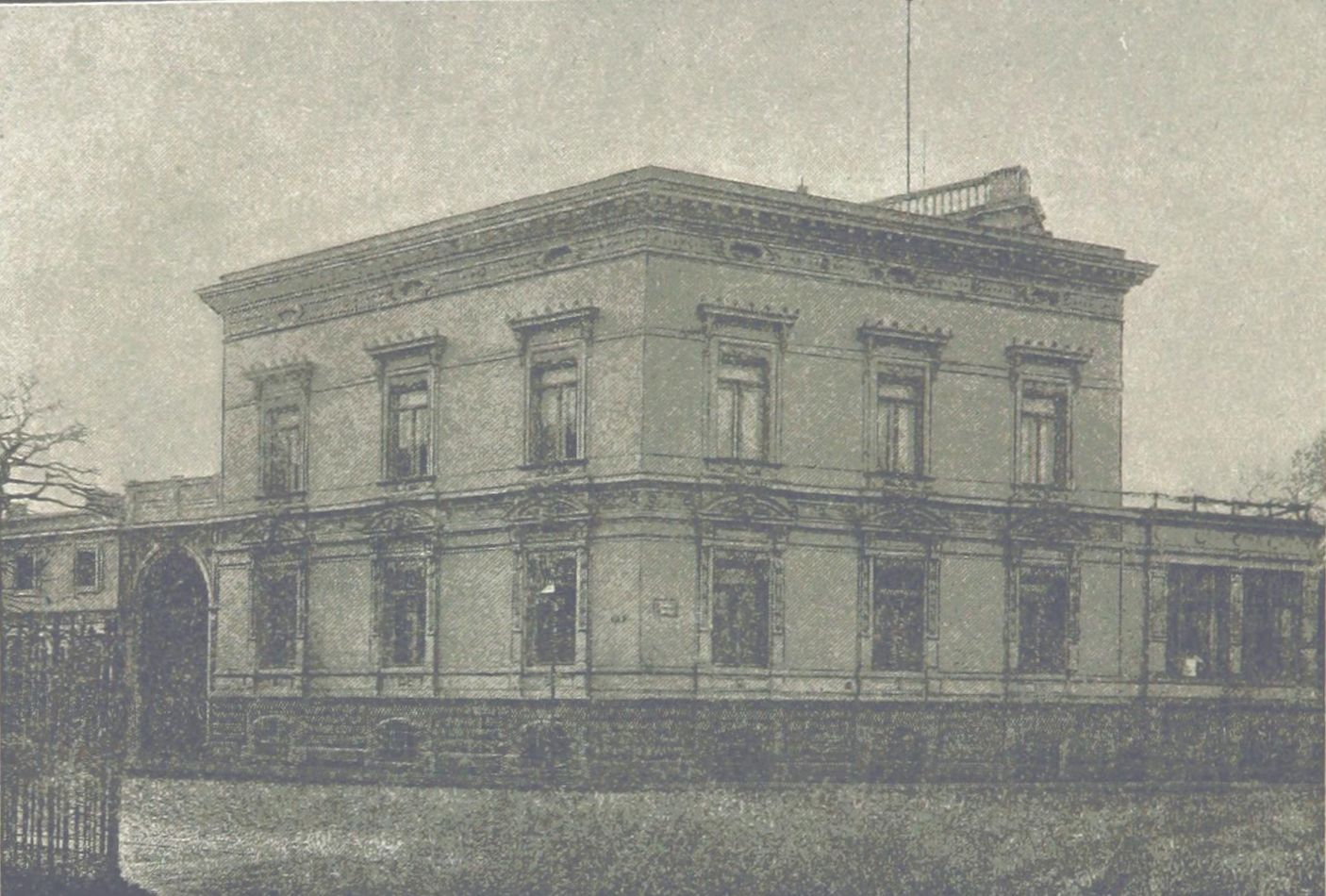 Villa Albin Ackermann-Teubner (Leipzig, Lortzingstraße 19 Ecke Emil-Fuchs-Straße), erbaut 1863 nach Plänen Carl Gustav Aeckerlein (1832–1886). Albin Ackermann-Teubner (1826-1903) war Schwiegersohn des Benedictus Gotthelf Teubner und ab 1853 Inhaber des Leipziger Traditionsverlages B.G. Teubner. In den 1850er Jahren stieß ein weiterer Schwiegersohn B. G. Teubners, Adolf Roßbach, der mit seiner Tochter Julia verheiratet war, als Mitinhaber in den Verlag ein. Nachdem sich Albin Ackermann-Teubner bereits 1862 auf dem Eckgrundstück Lortzingstraße 19 Ecke Emil-Fuchs-Straße (damals Zöllnerstraße) eine Villa hatte erbauen lassen, folgte 1870 auf der gegenüber liegenden Straßenseite der Lortzingstraße 16, ebenfalls Ecke Emil-Fuchs-Straße, der Neubau der Villa Adolf Roßbach.